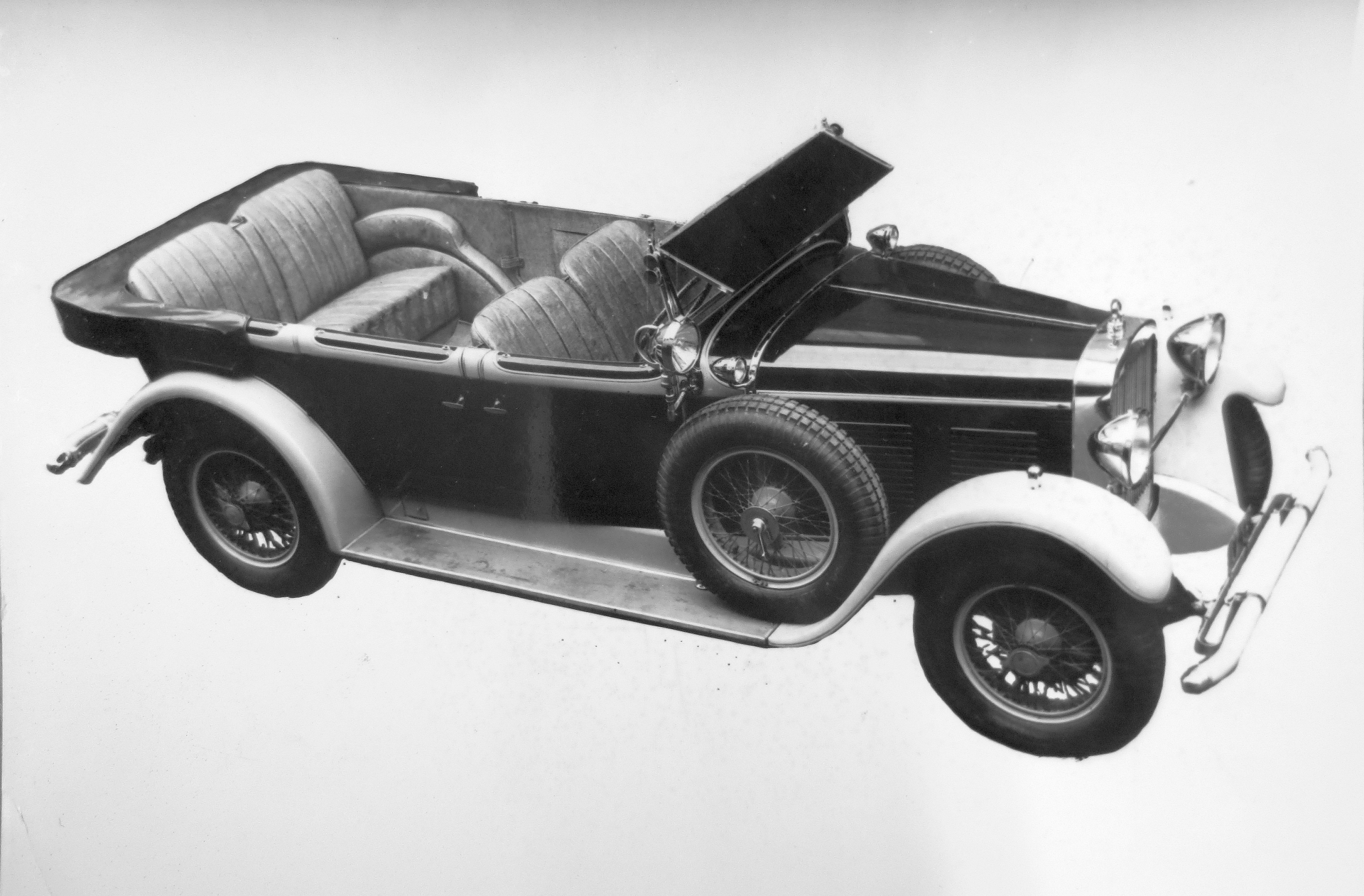 Walter 6B (1929) faeton